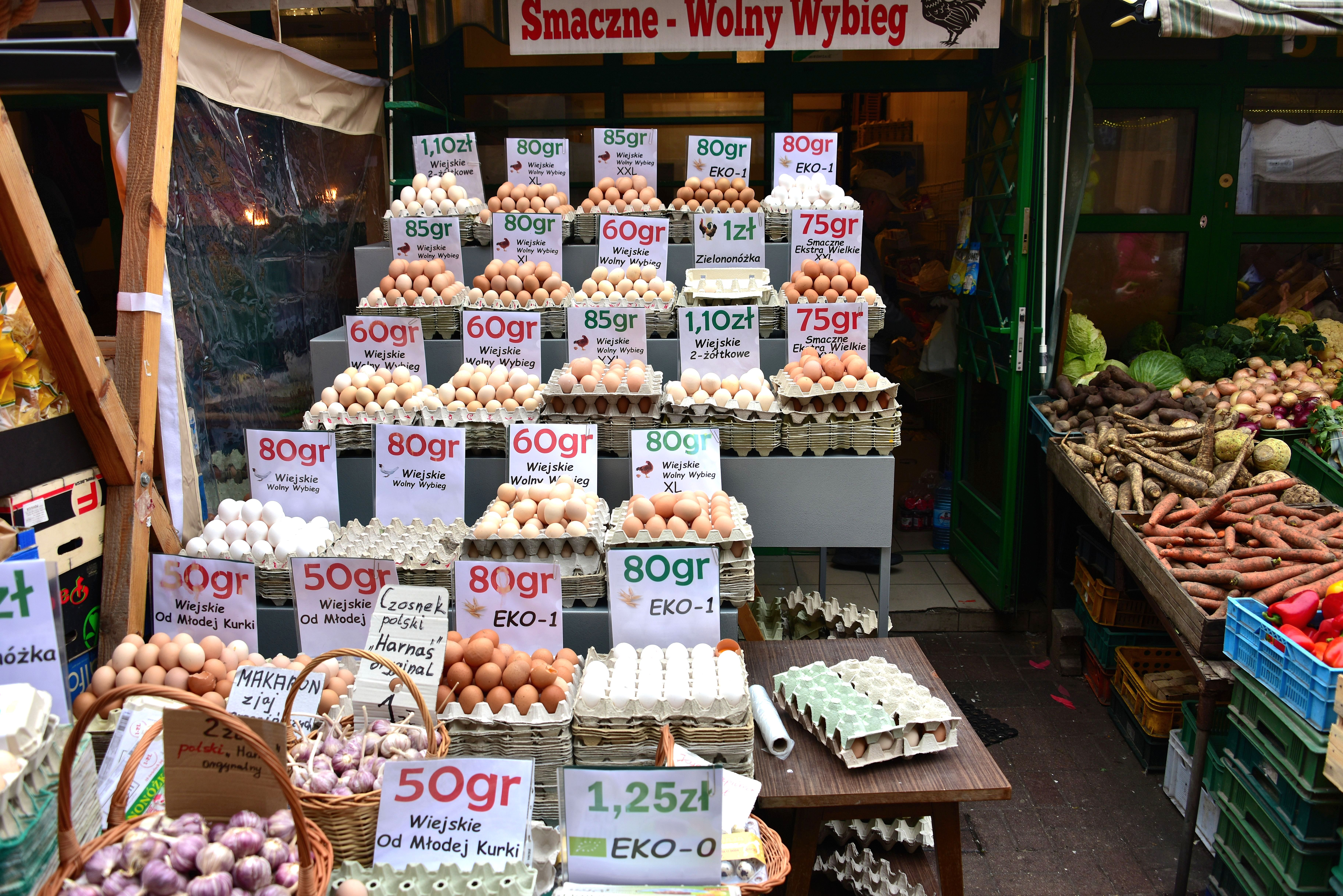 Sprzedaż jaj z wolnego wybiegu przy Hali Mirowskiej w Warszawie